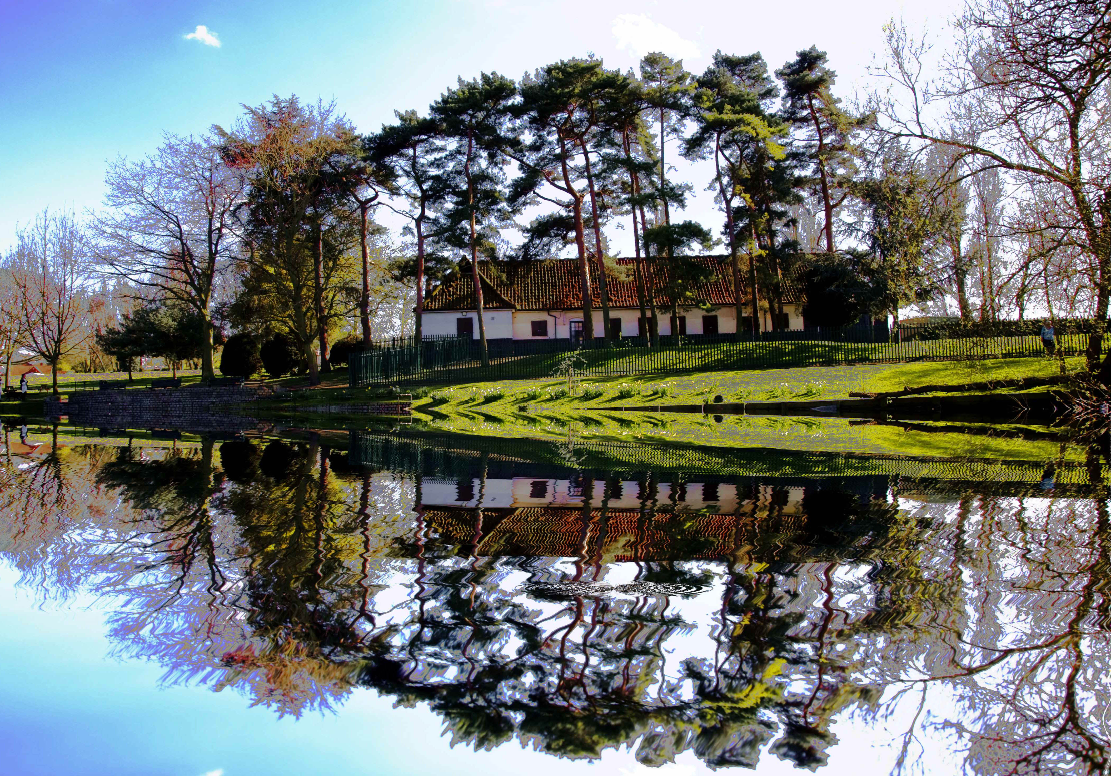 Beddington Park 5